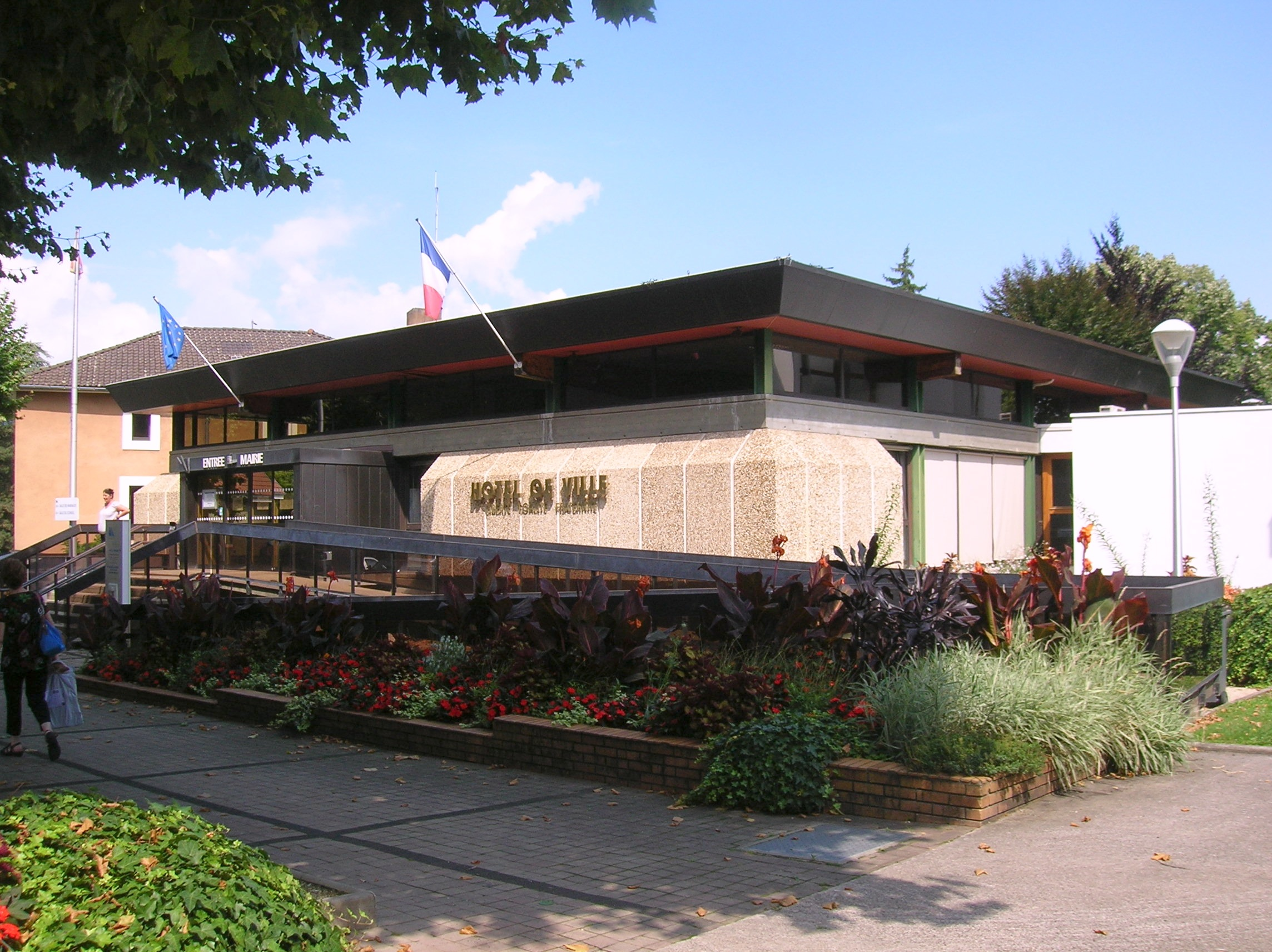 Hôtel de ville d'Eybens, Eybens, Isère, Rhone Alpes, France.